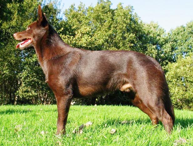 Australian Kelpie: Yirr-ma Bashyr of the Two Chestnuts. Korrekte Bezeichnung nachgetragen und etwas nachgearbeitet Caronna 09:45, 19. Mär 2006 (CET)